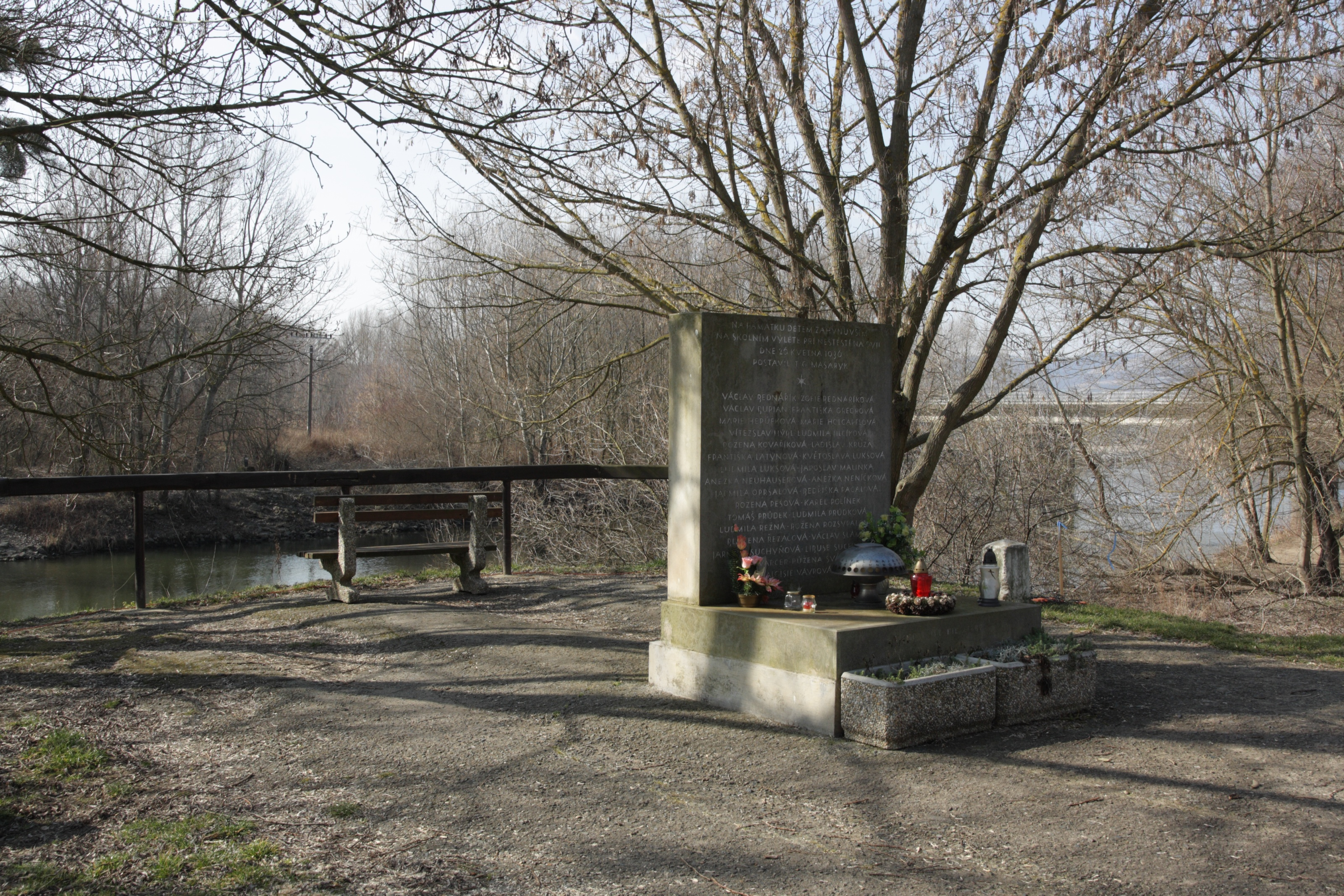 Nové Mlýny - pomník neštěstí na Dyji z roku 1936.